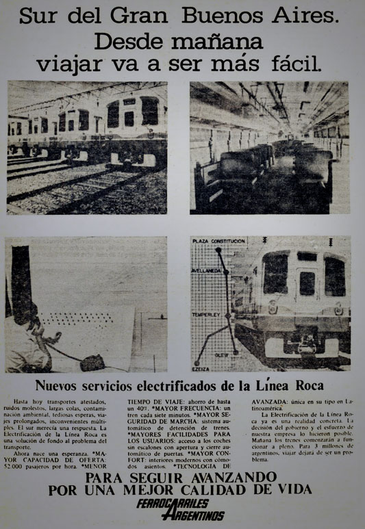 Afiche promocional de la electrificación del Ferrocarril Roca (1985). Ferrocarriles Argentinos.